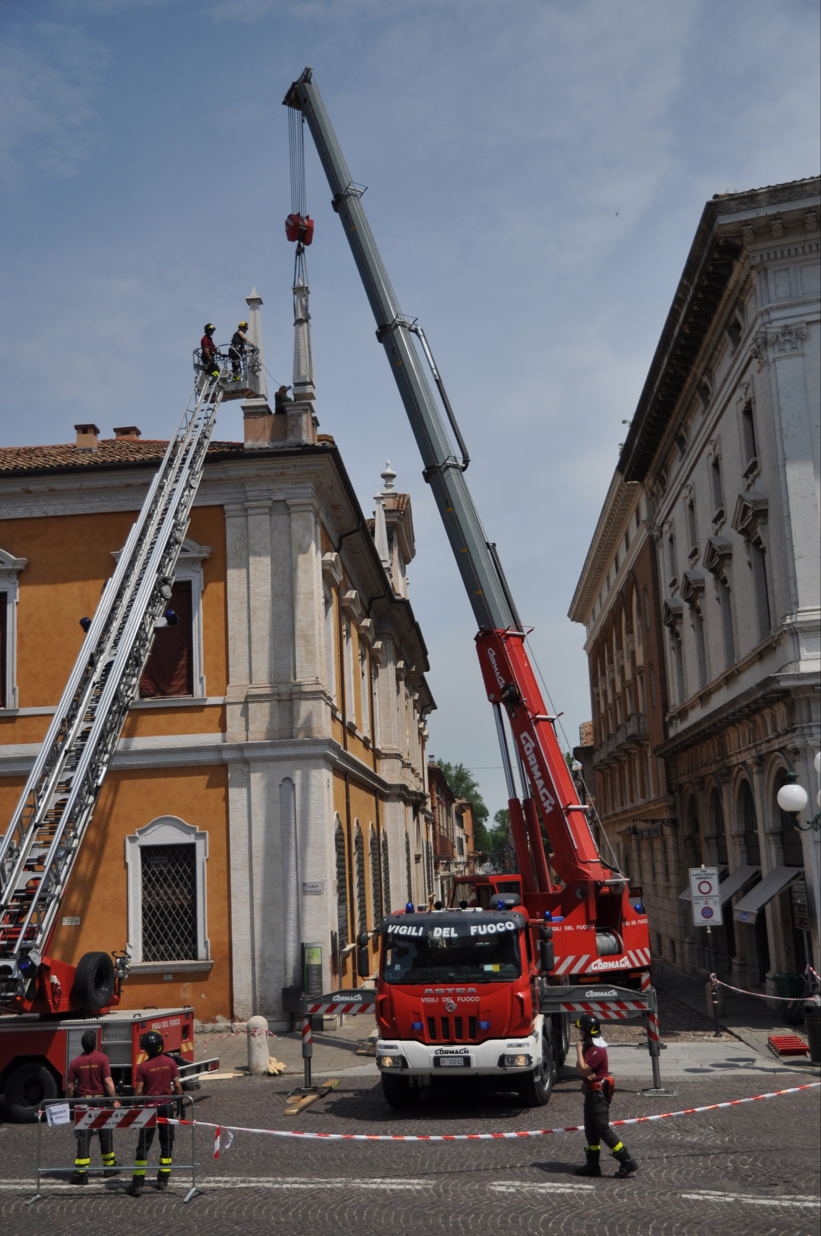 Terremoto 2012, palazzo della Borsa, vista dal Castello Estense